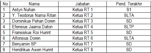 Ketua RT Lewoloba update